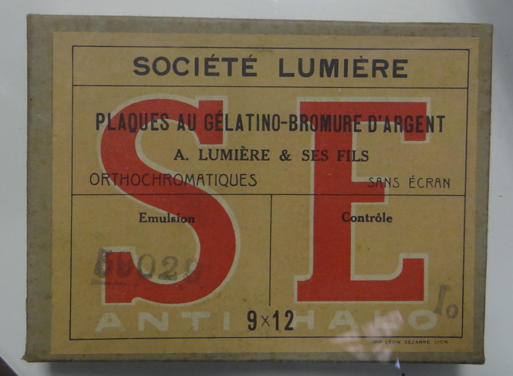 Centre de mémoire de la verrerie d'en Haut -Plaque photographique